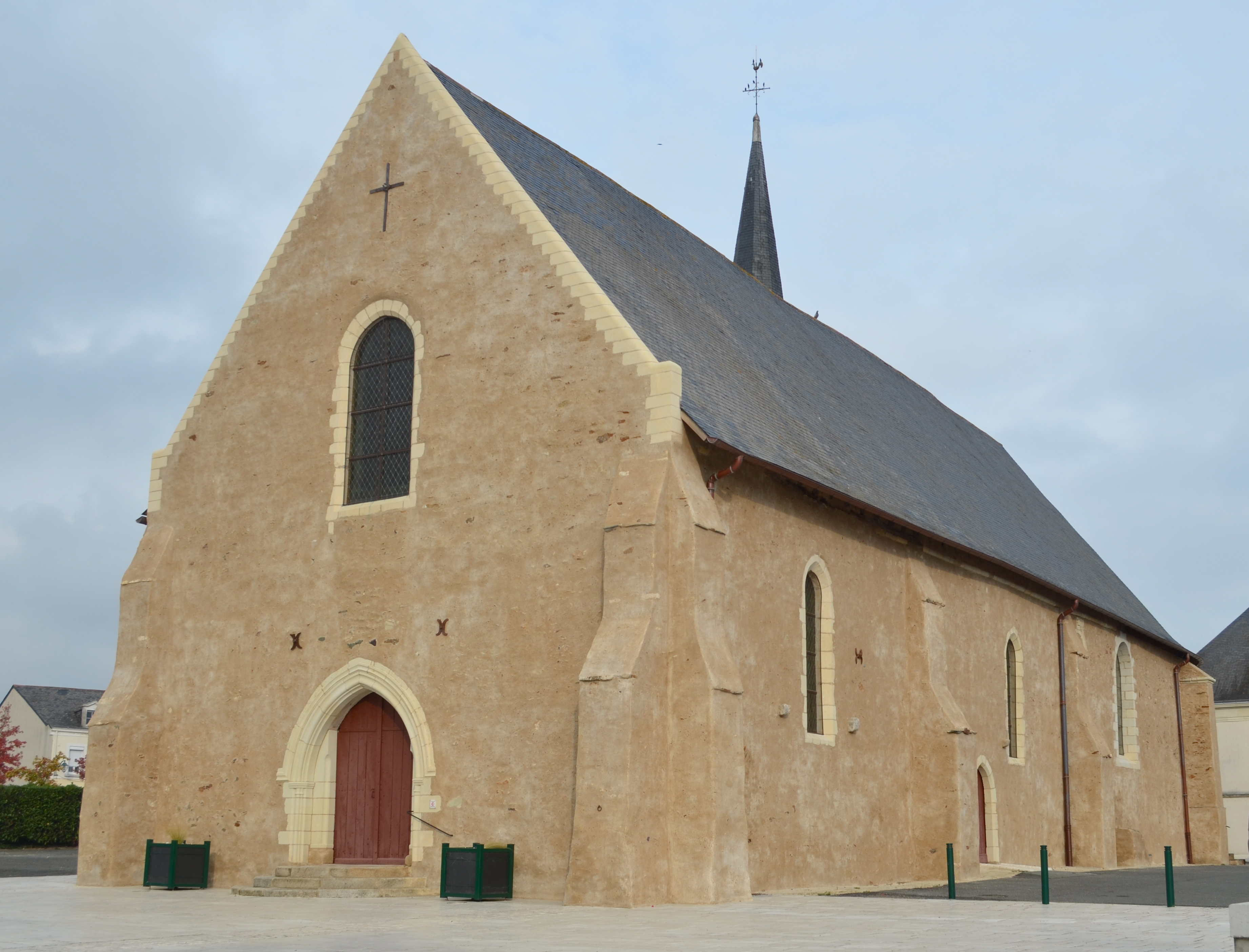 Eglise Saint-Pierre - Champtocé-sur-Loire (Maine-et-Loire)